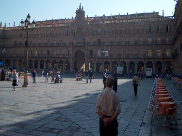 中文（中国大陆）: 宽高比从 16:9 拉伸到 4:3 的图像